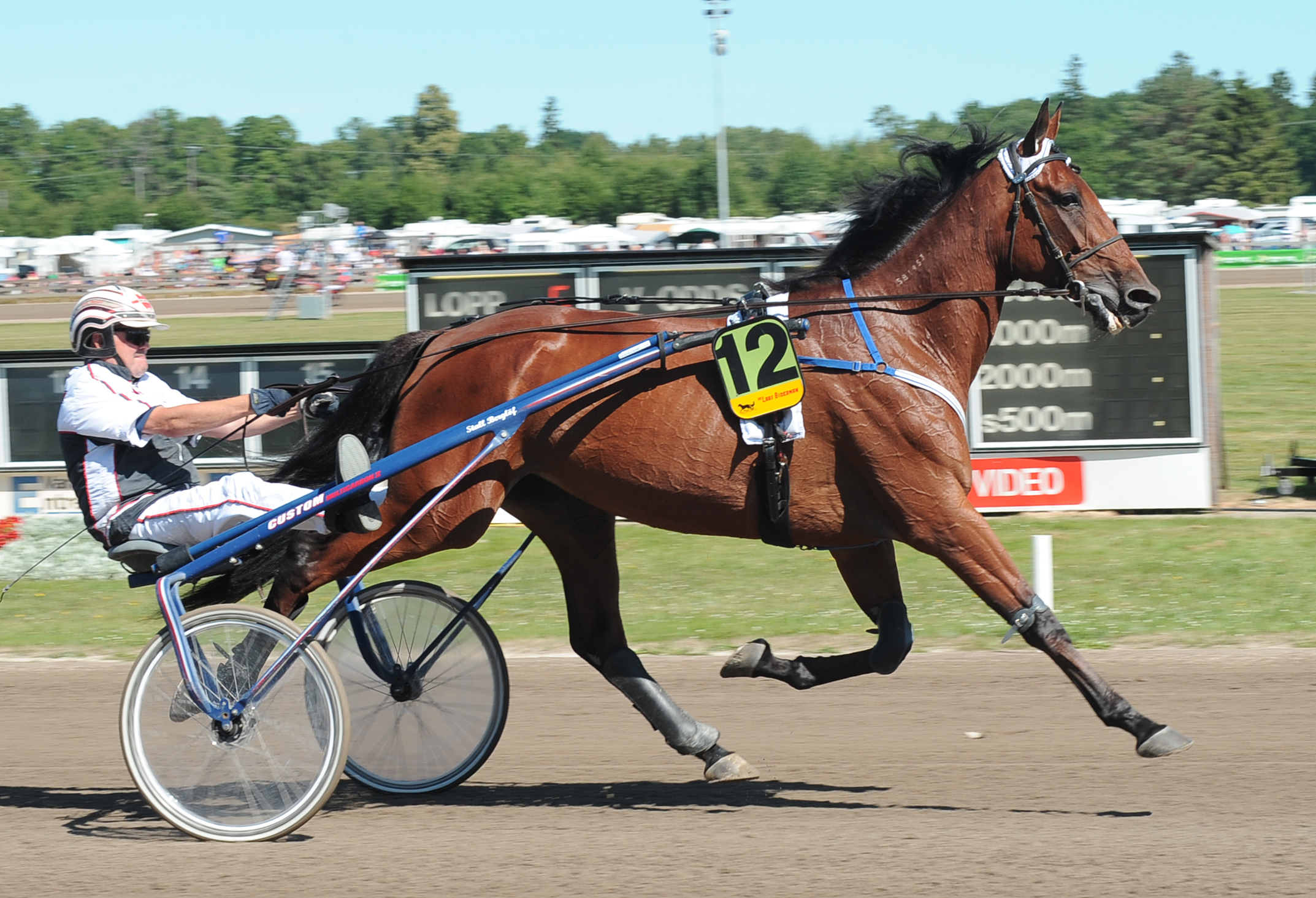 Kusken Erik Berglöf och travaren Pina Colada på Axevallatravet.